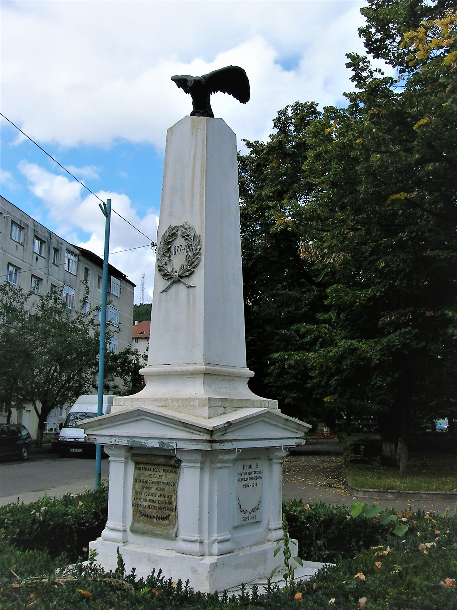 Monumentul eroilor din războiul pentru independență.